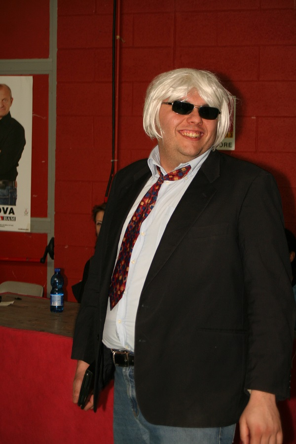 Il presidente Marco Folloni, nei panni del suo alter-ego Flavio Sbrigatore